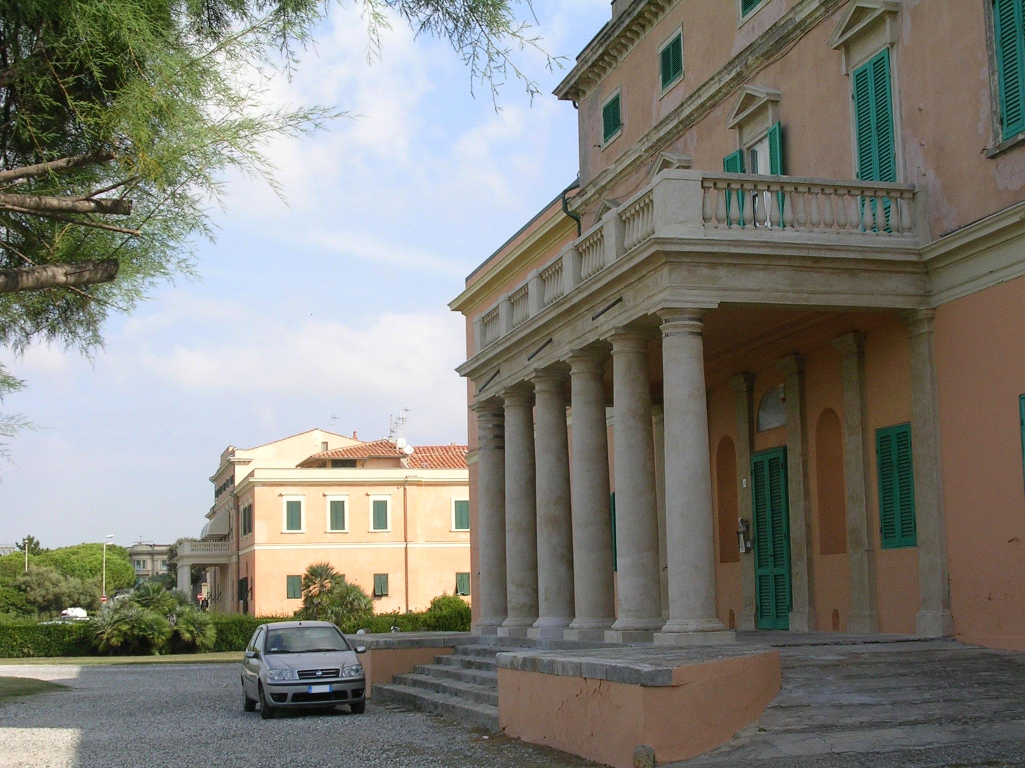 Livorno: Casini d'Ardenza progettati da Giuseppe Cappellini (XIX secolo).